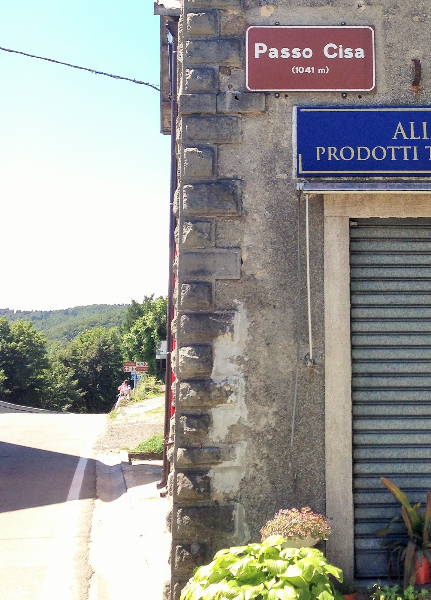 Señalización en el Passo della Cisa